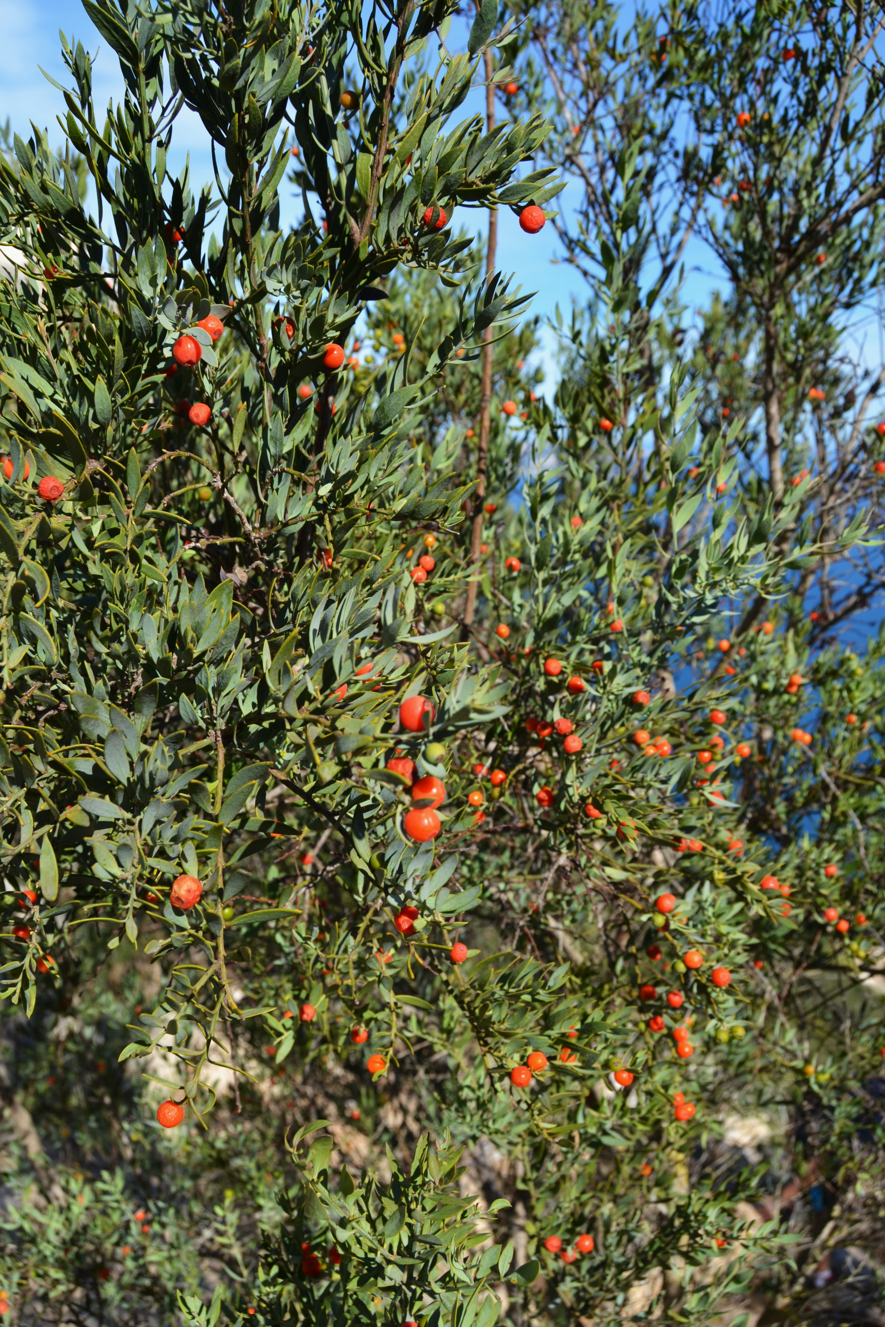 Ginestó valencià al penyal d'Ifac.